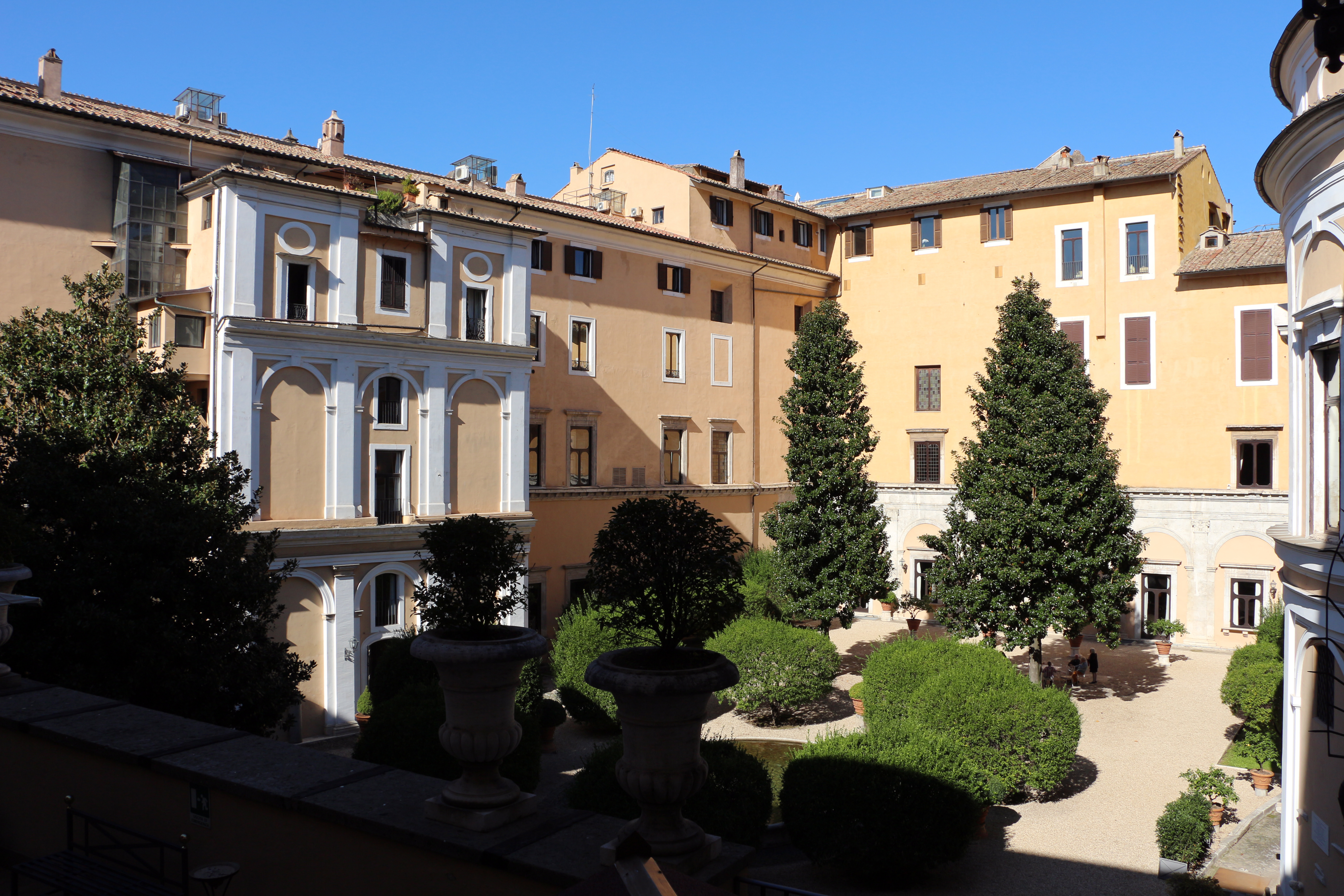 Palazzo colonna, giardino verso santi apostoli 06.JPG